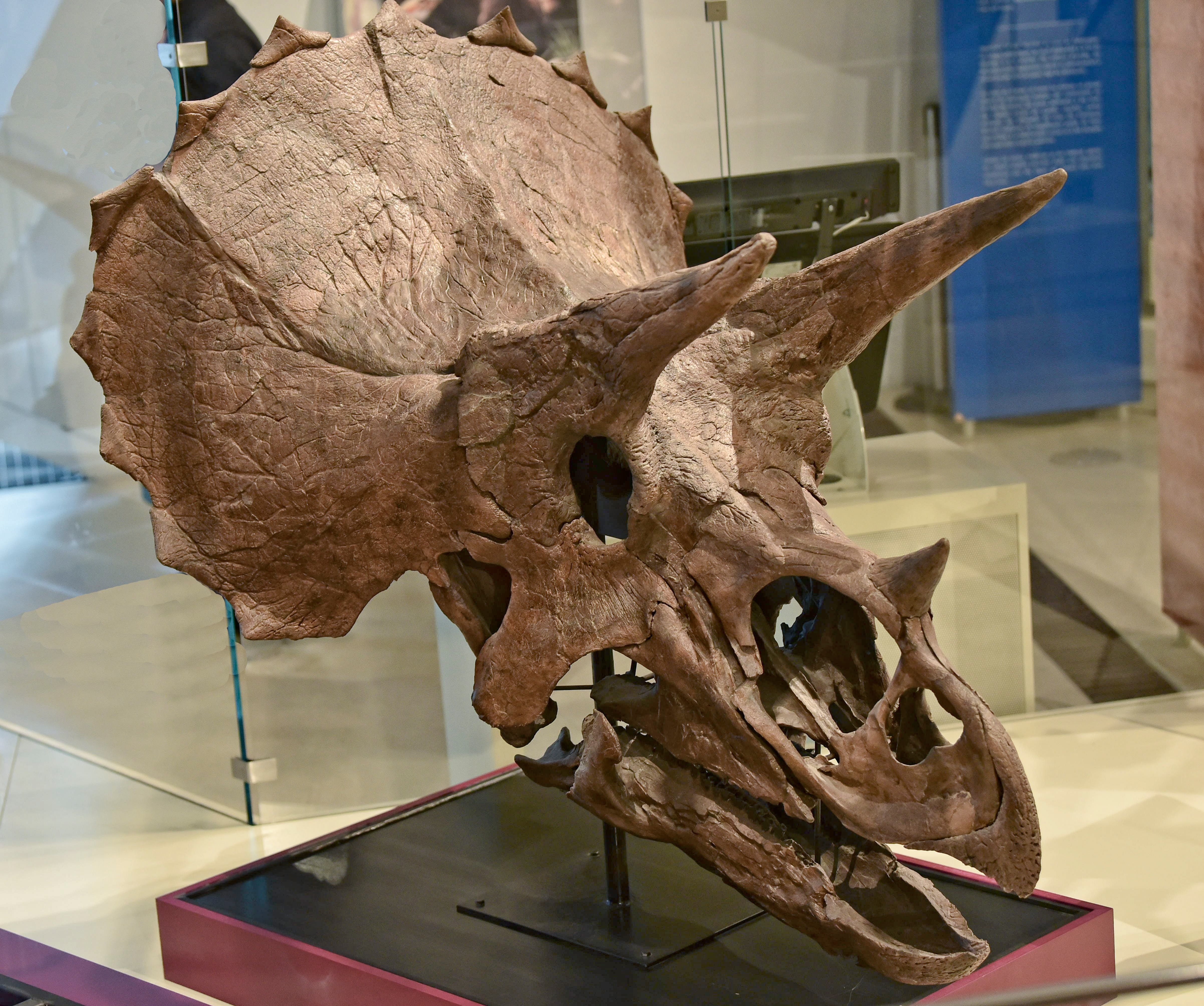 Череп динозавра Трицератопс горрідус (Triceratops horridus) у Королівському музеї Онтаріо (ROM) у Торонто